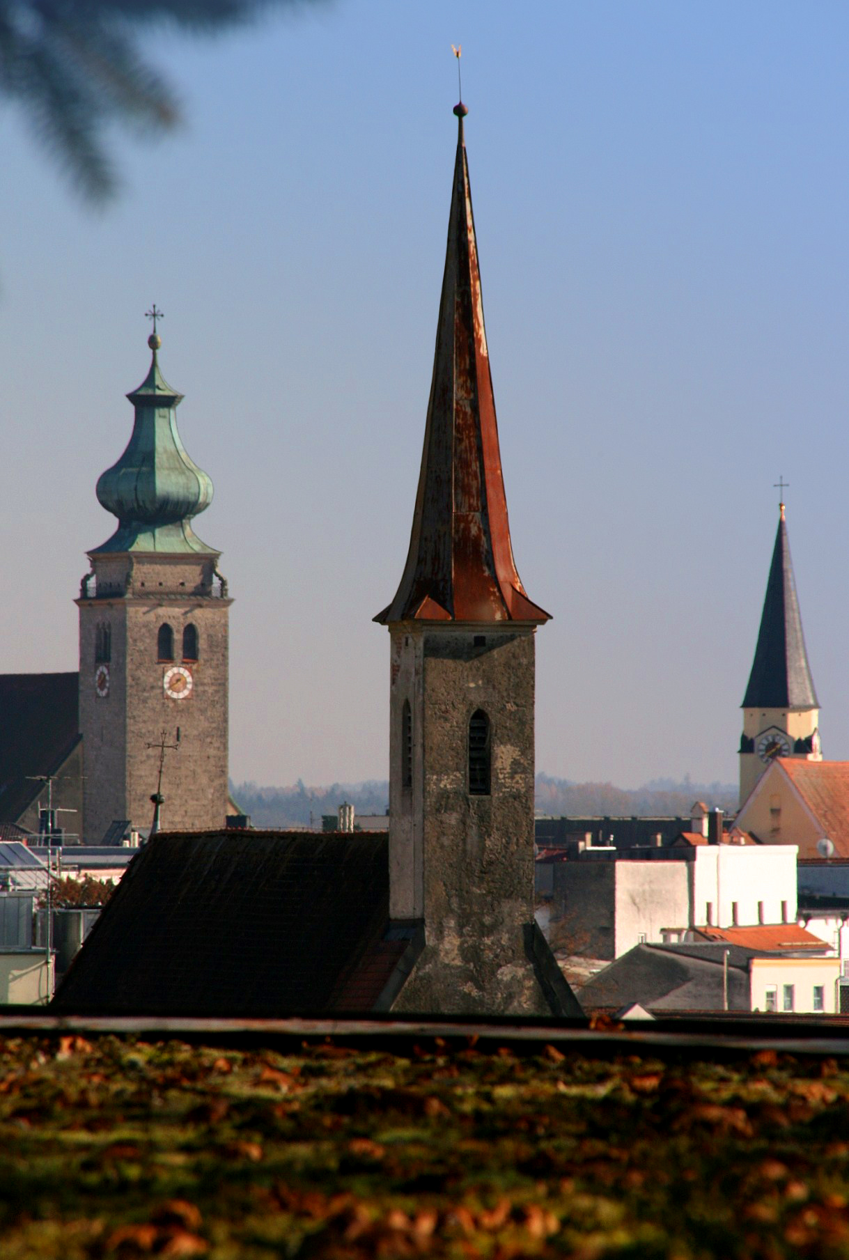 Die drei erhaltenen historischen Kirchen im Stadtzentrum von Mühldorf am Inn (Landkreis Mühldorf am Inn, Oberbayern). Links die Stadtpfarrkirche Sankt Nikolaus, mit romanischem Turm und barocker Spitze; im Vordergrund St. Katharina (in der Katharinen-Vorstand) mit Dachreiter; rechts die Frauenkirche mit historistischer Turmspitze. Die drei Gotteshäuser gehören zur katholischen Kirche.